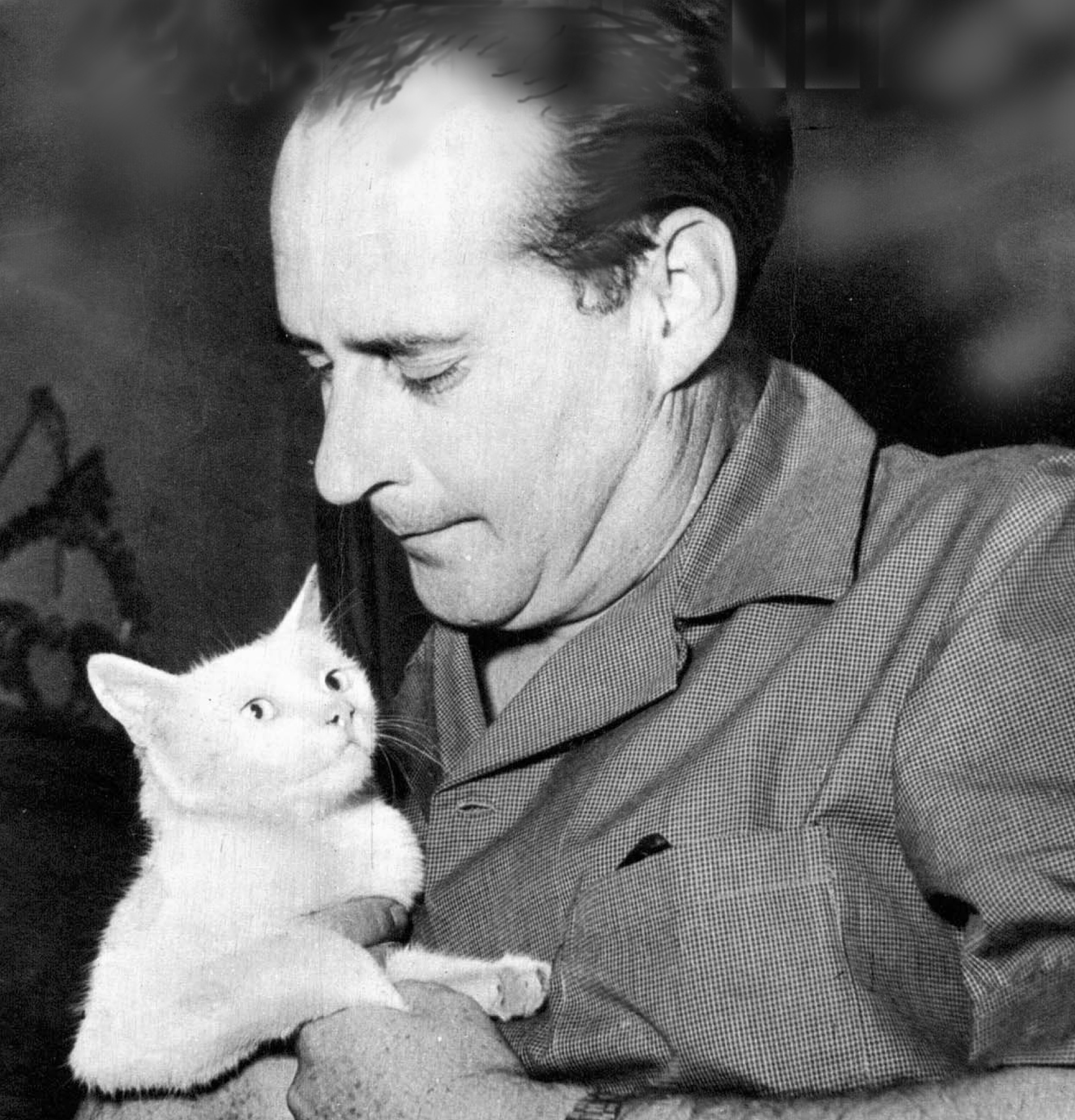 Roberto Rossellini con la gattina Saha dell'episodio Invidia da lui diretto ne I sette peccati capitali (1952)